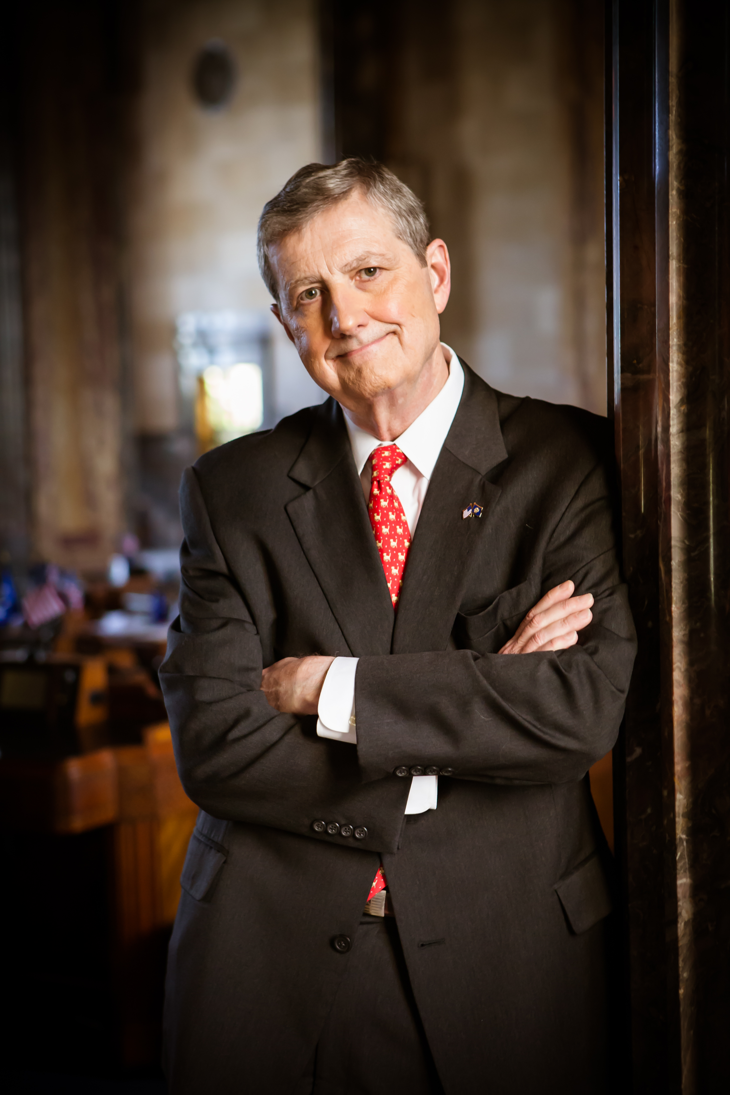 kennedy-1071